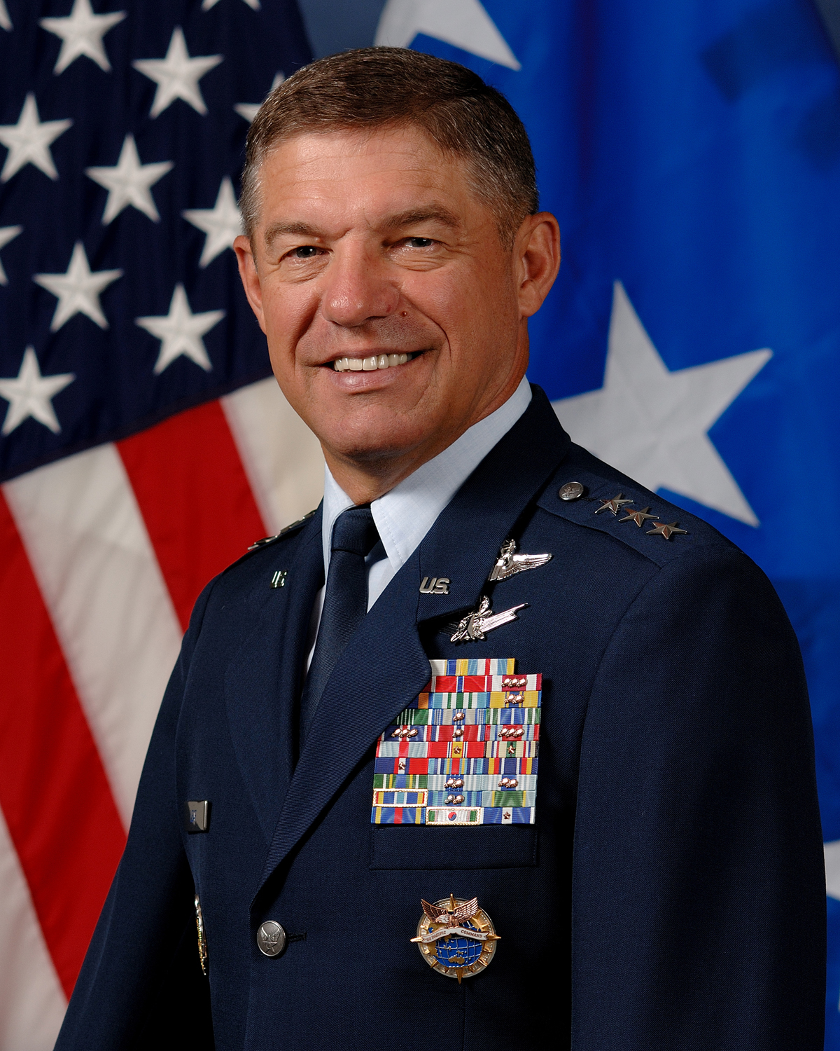 Lieutenant General Daniel P. Leaf; Interim Commander US Pacific Command.